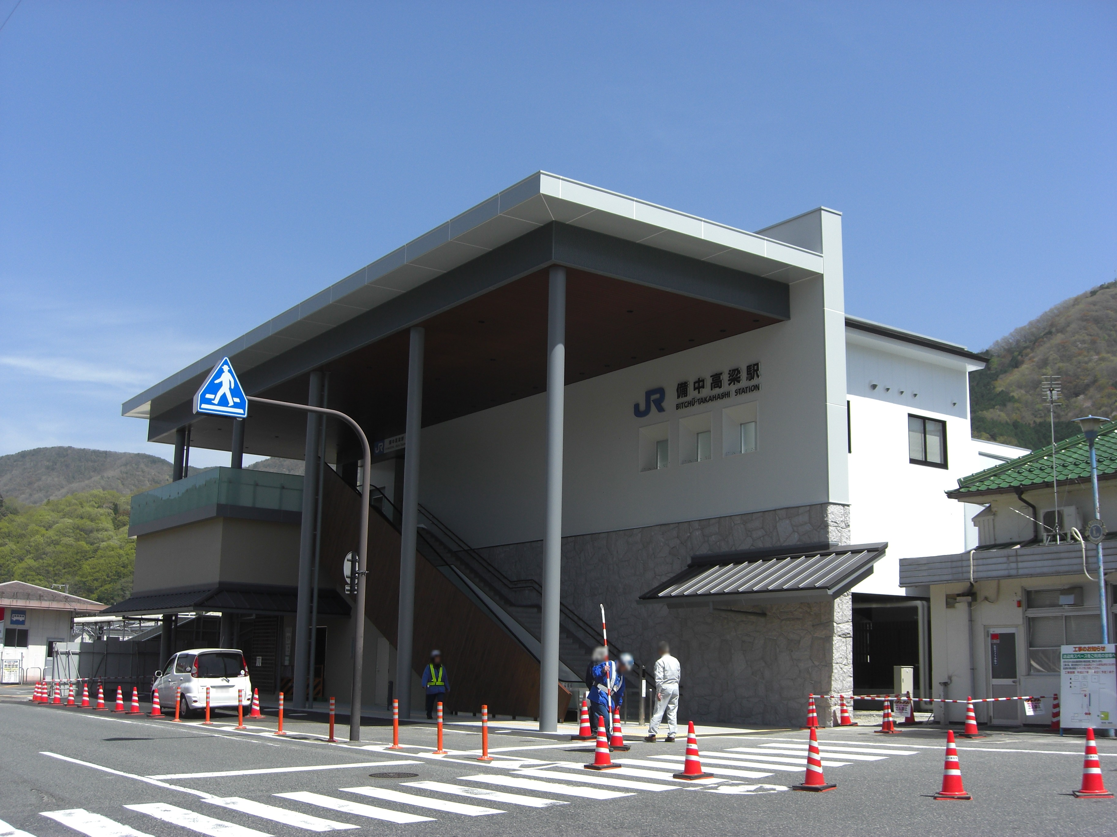 2015年4月11日に供用開始された、備中高梁駅（西日本旅客鉄道 伯備線）の橋上駅舎。 投稿者（1stfinal）本人による作品。